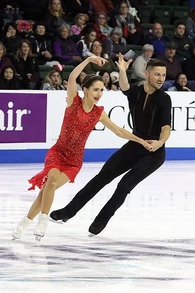 Лайла Фир и Льюис Гибсон на этапе Гран-при Skate America 2018